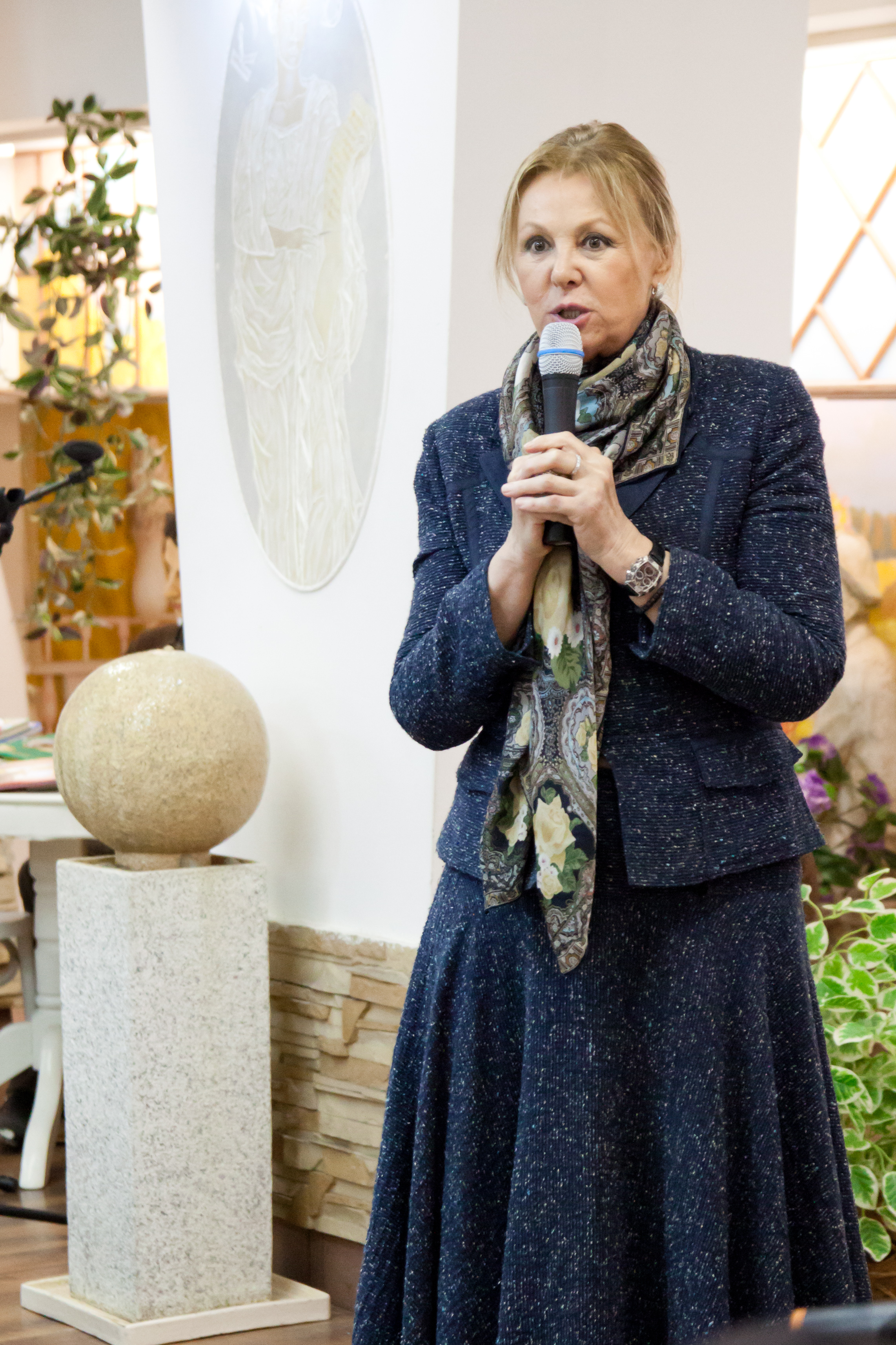 Наталья Селезнёва